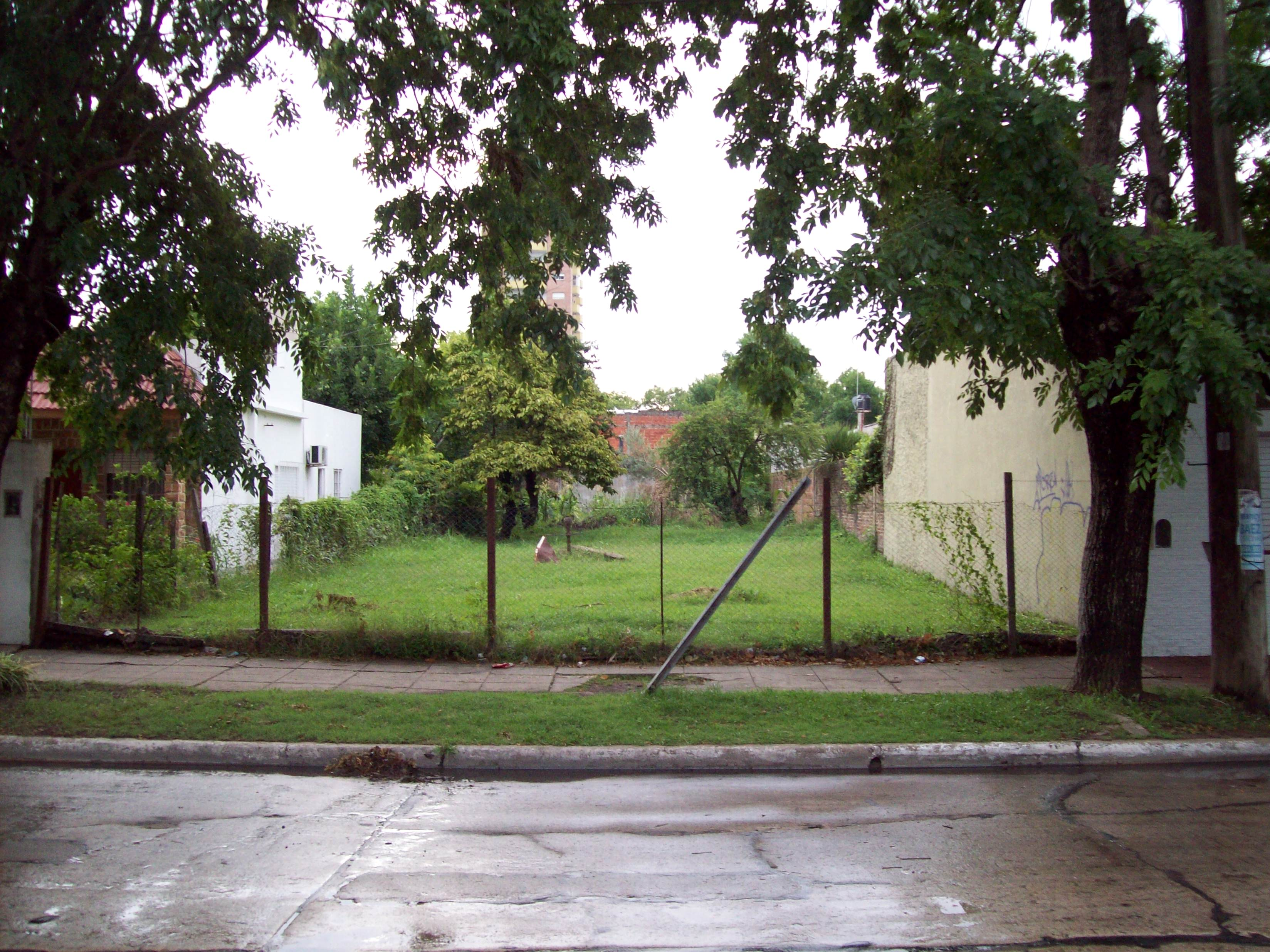 Terreno baldío en Florencio Varela.